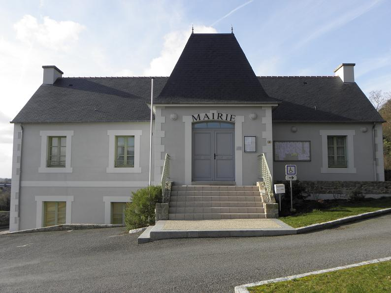 Mairie du Mont-Dol (35).